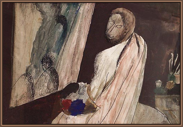 Idősebb Benedek Jenő (Kecskemét, 1906. január 16. – Budapest, 1987. július 19.) magyar festőművész Festő című alkotása, 1950 - 30x42 cm, gouache